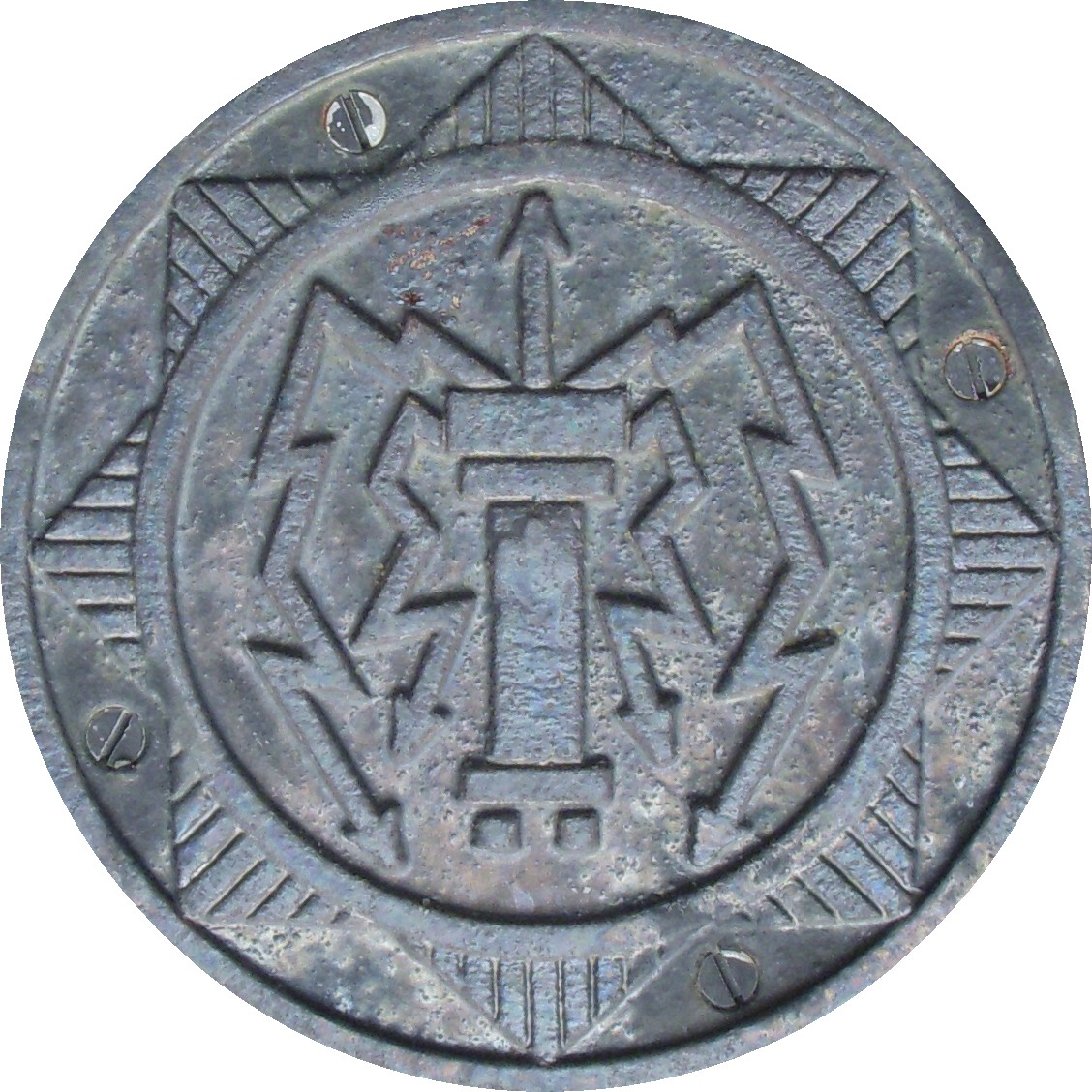 Stockholms allmänna telefon AB, logo på telekiosk, Kornhamnstorg